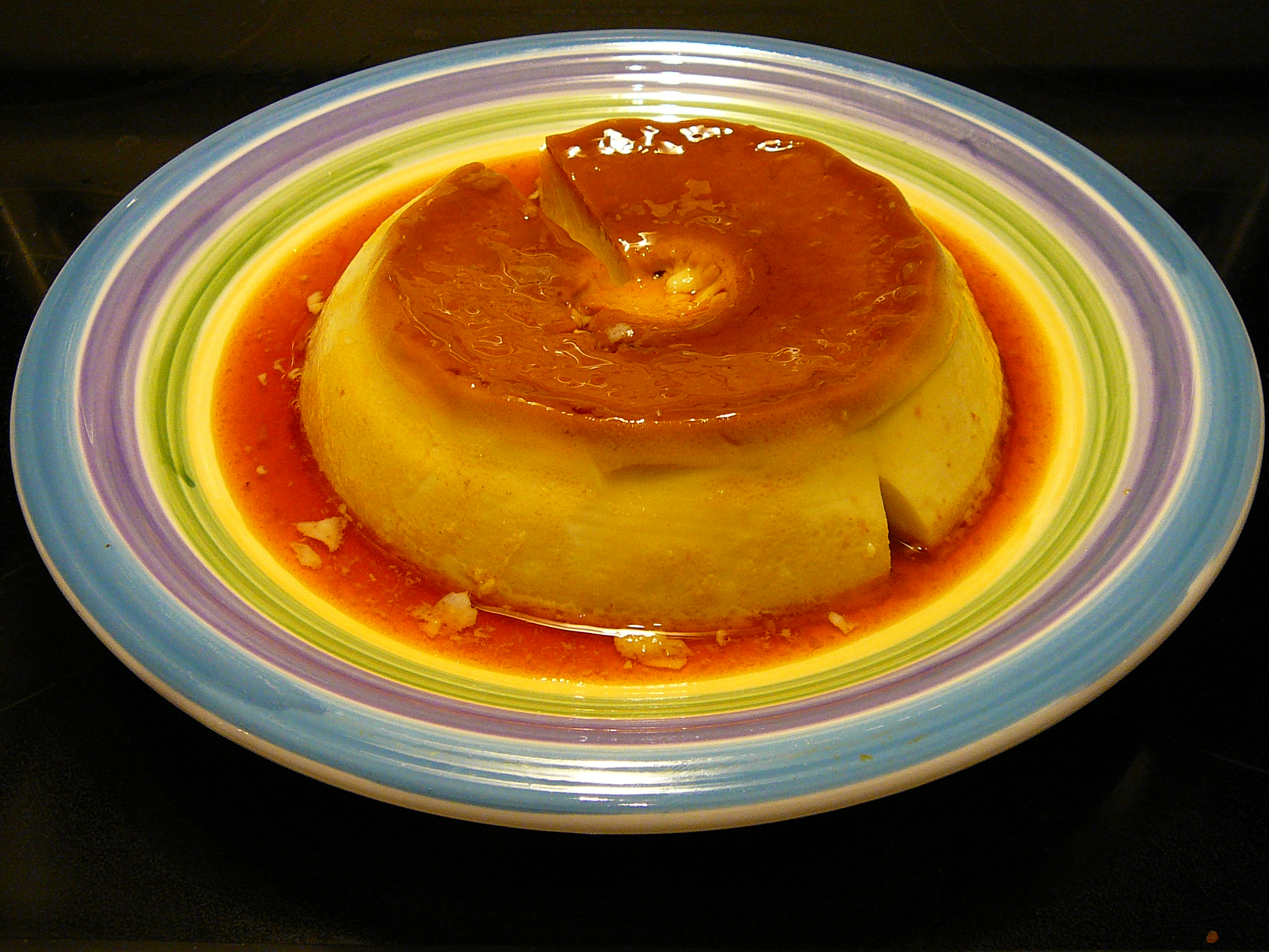 Homemade Flan